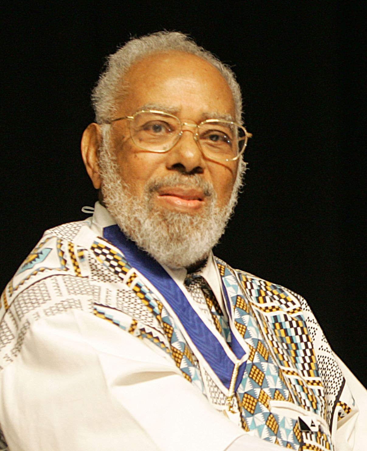 Abdias do Nascimento, ex-senador pelo Rio de Janeiro (1997-99)